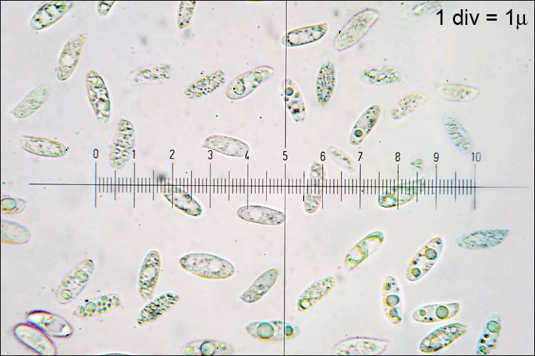 Polyporus squamosus (Huds.) Fr.